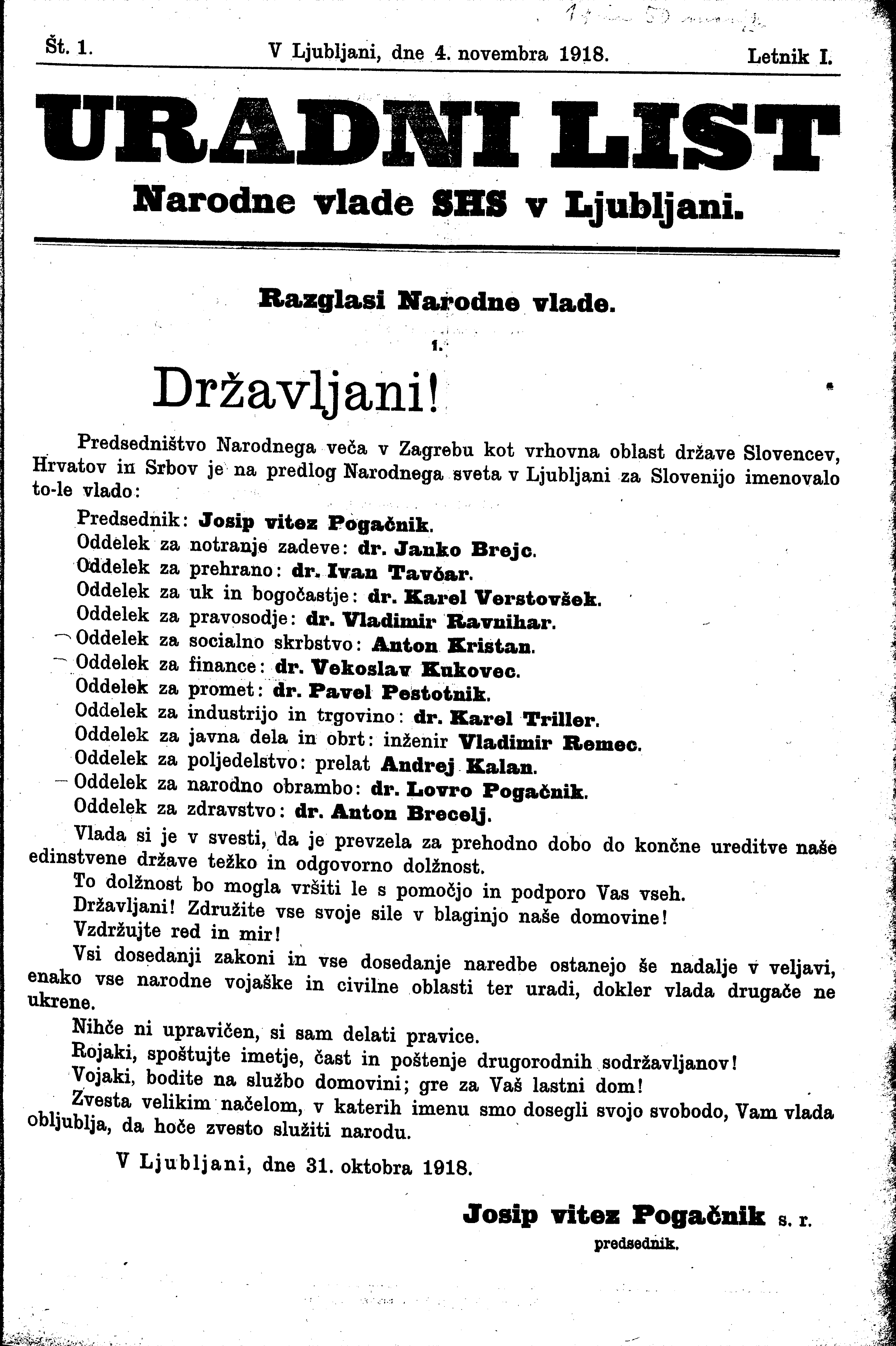 Razglas Narodne vlade SHS, objavljen v uradnem listu 4. 11. 1918. Predsednik vlade Josip Pogačnik je v razglasu državljanom predstavil člane vlade in jih pozval k državotvornemu obnašanju.